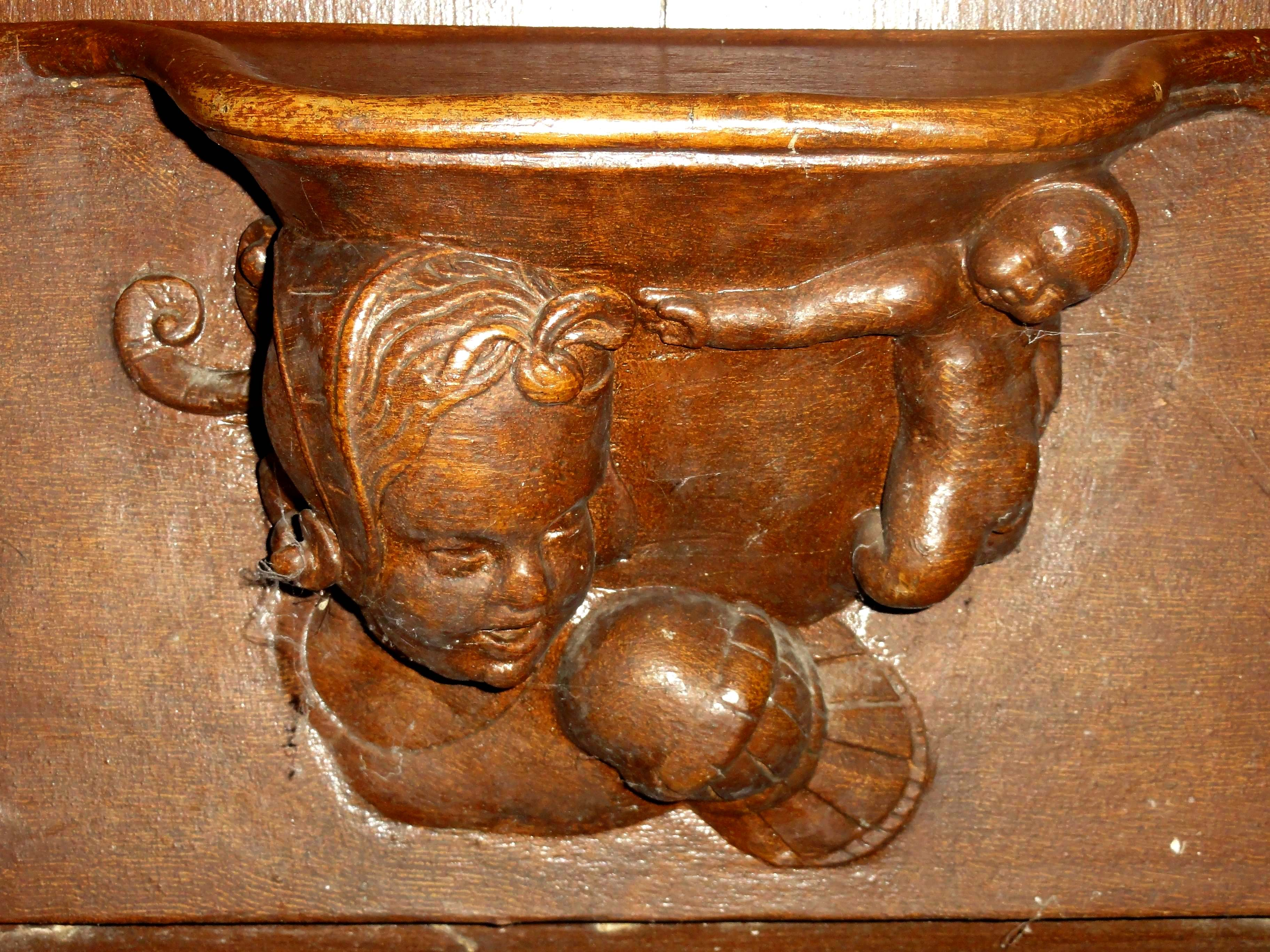 Stalles du XVIe siècle provenant du prieuré Saint-Nicolas d'Acy, commune de Courteuil ; miséricorde (du nord vers le sud, contre le sens des aiguilles de l'horloge).